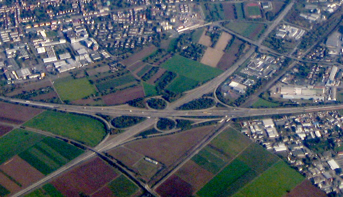 Autobahnkreuz Heidelberg, Blick aus Westen nach Osten.